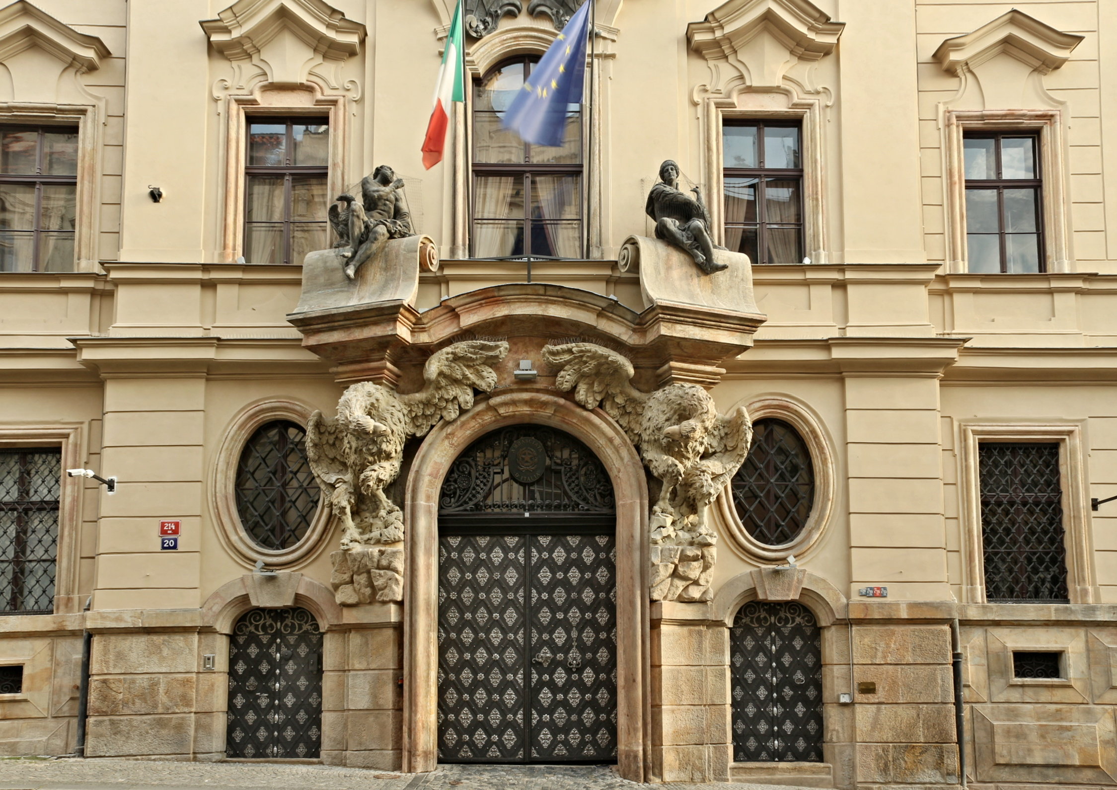 Kolovratský palác v Nerudově ulici